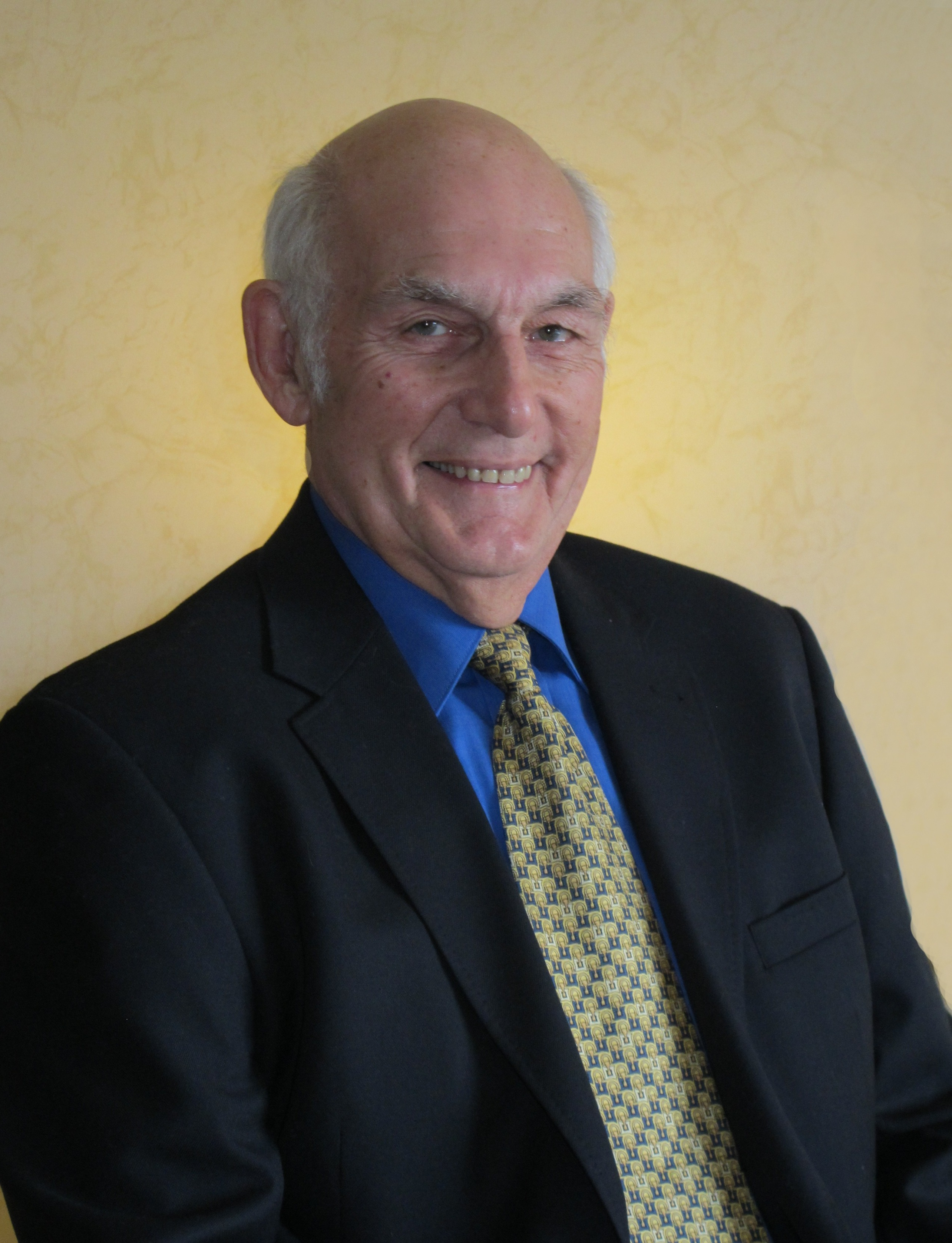 Prof. Siegfried Theissen, * 28.03.1940 Eupen, Belgium. Fachgebiet Niederländische Grammatik und Dialektik, Universität Lüttich, ULg